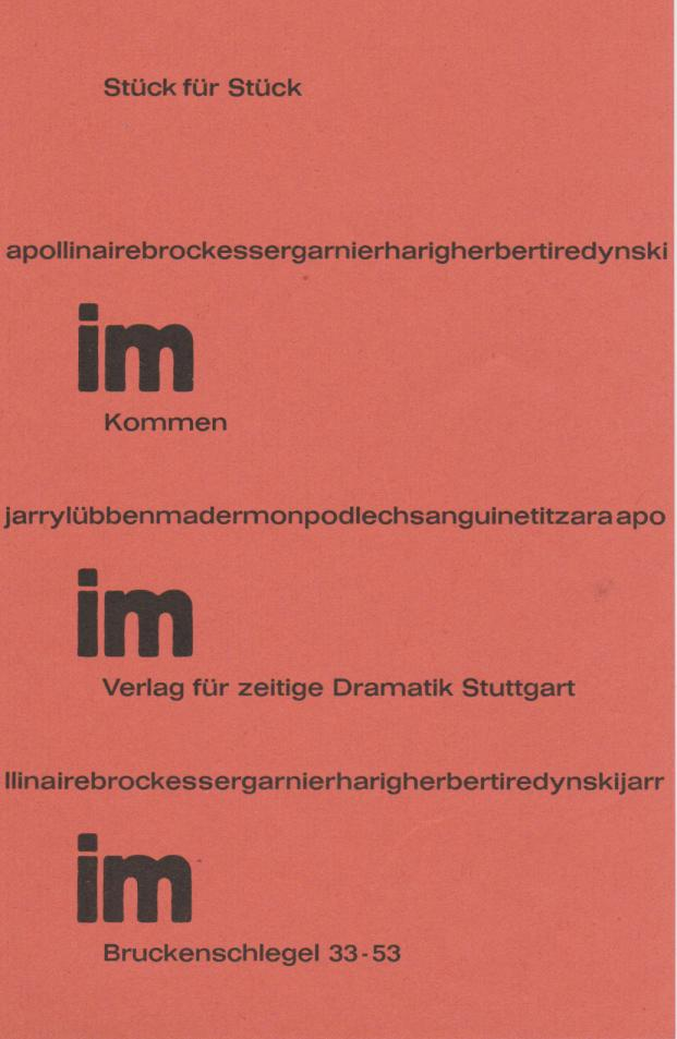 Verlag für zeitige Dramatik, „Stück für Stück im Kommen“, Stuttgart 1966/1967 (Flyer).